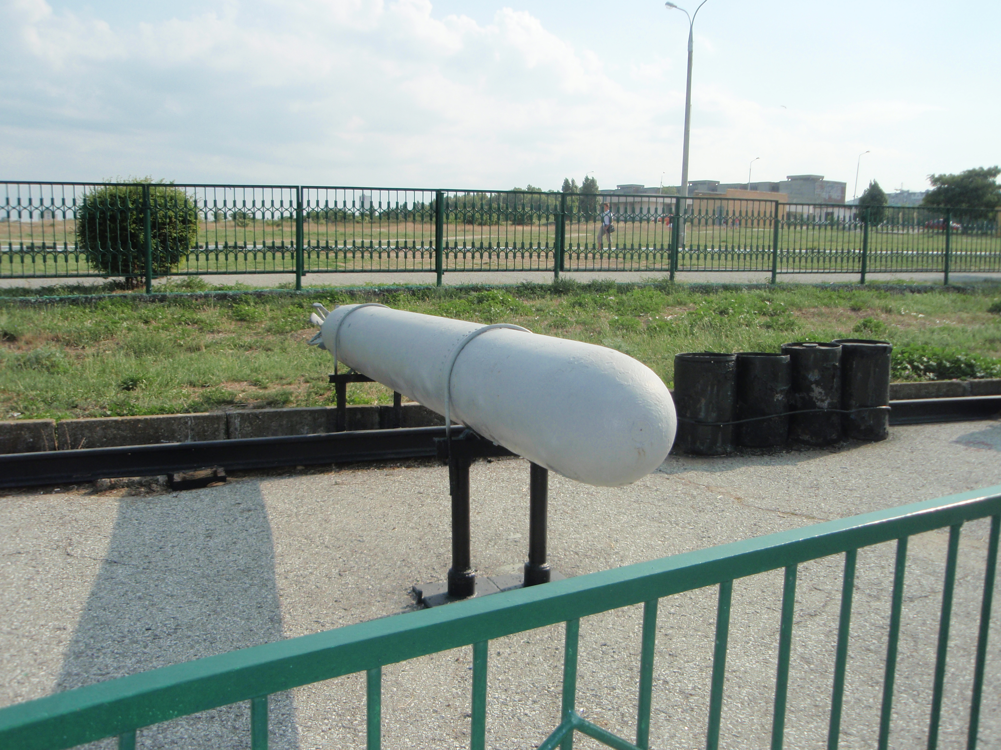 Советская торпеда времён Второй Мировой войны в музее-заповеднике «Малая Земля» (г.Новороссийск)